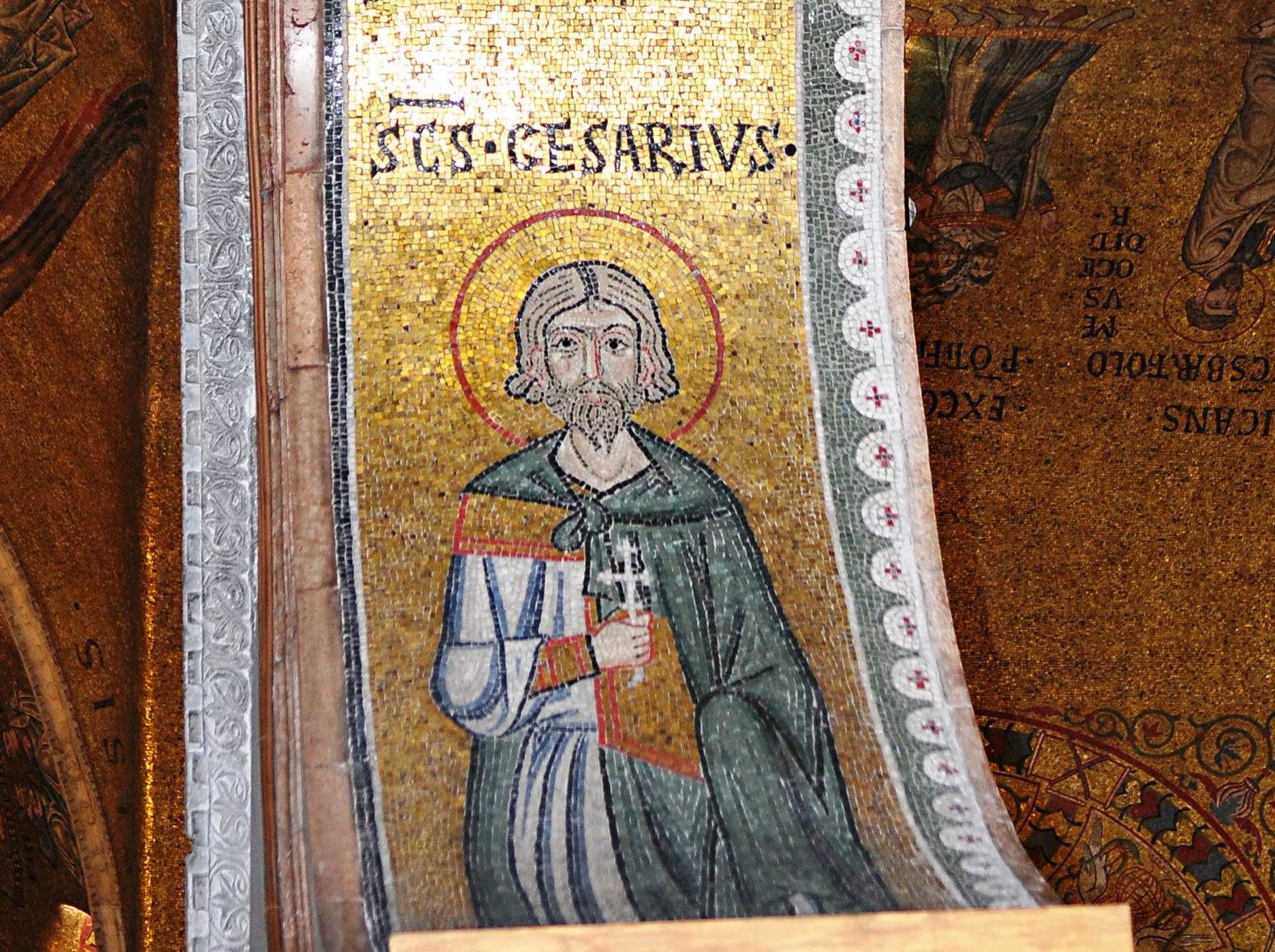 Mosaico "SANCTUS CESARIUS", Basilica di San Marco a Venezia, sottarco inferiore della galleria sud.